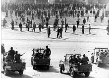 Les militants d'extrême droite et d'extrême gauche contre les forces de l'ordre.